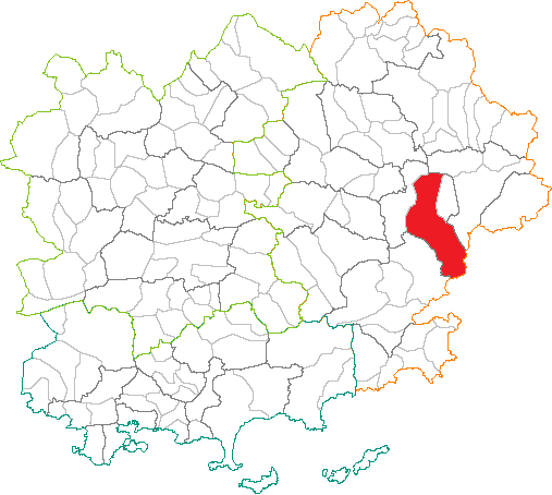 carte administrative